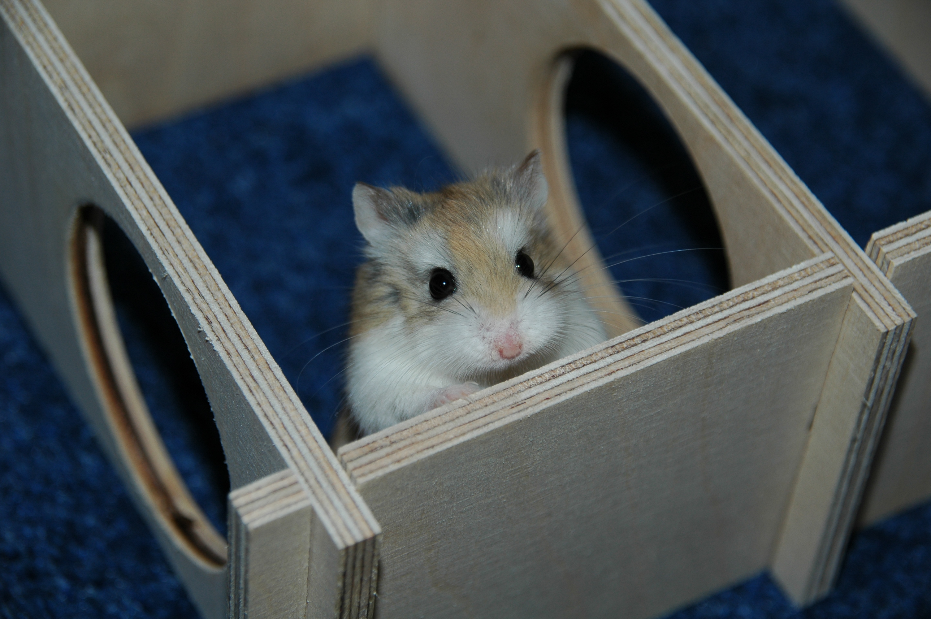 Phodopus roborovskii, male, eleven months old